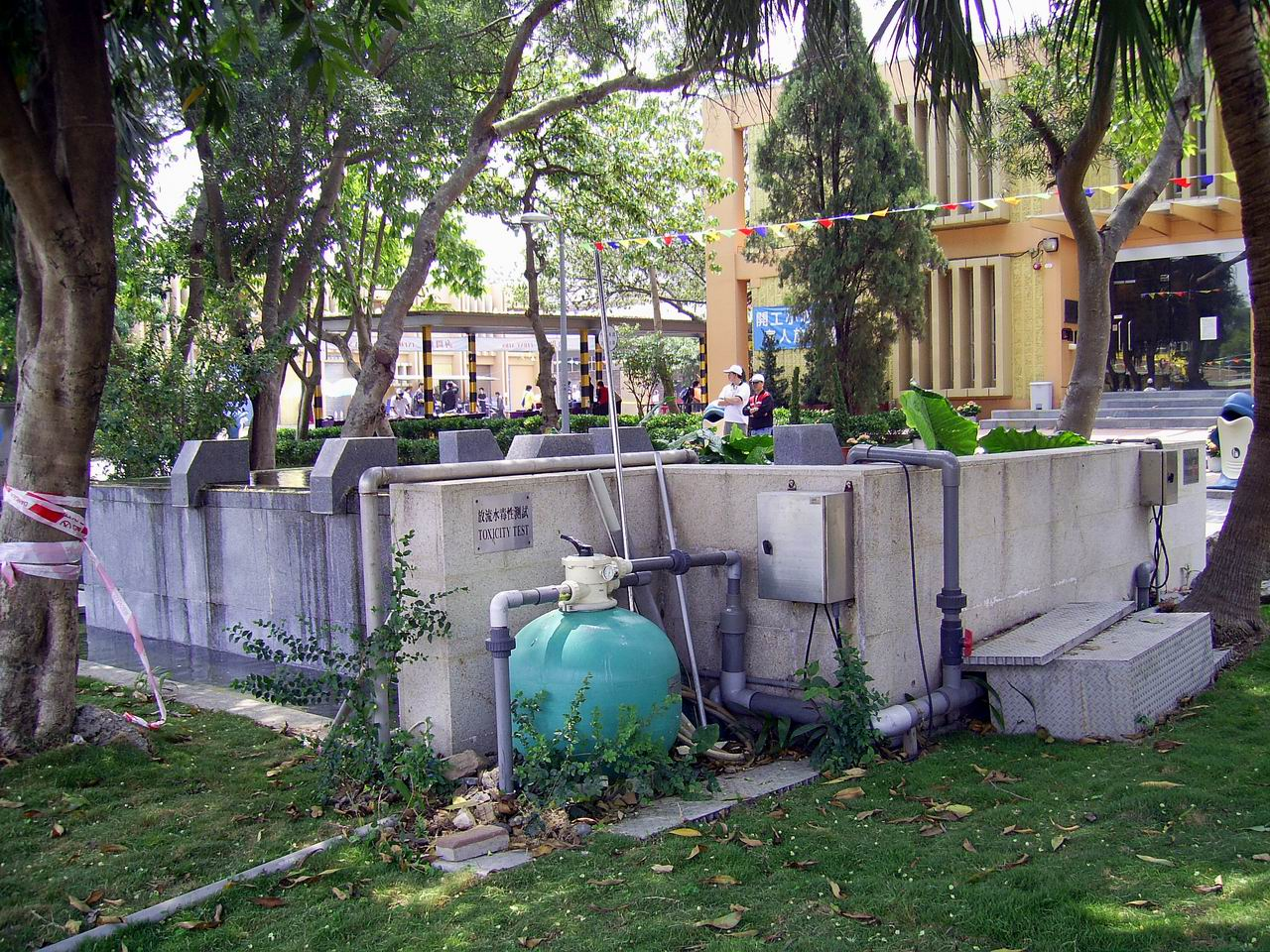 沙田污水處理廠放流水毒性測試